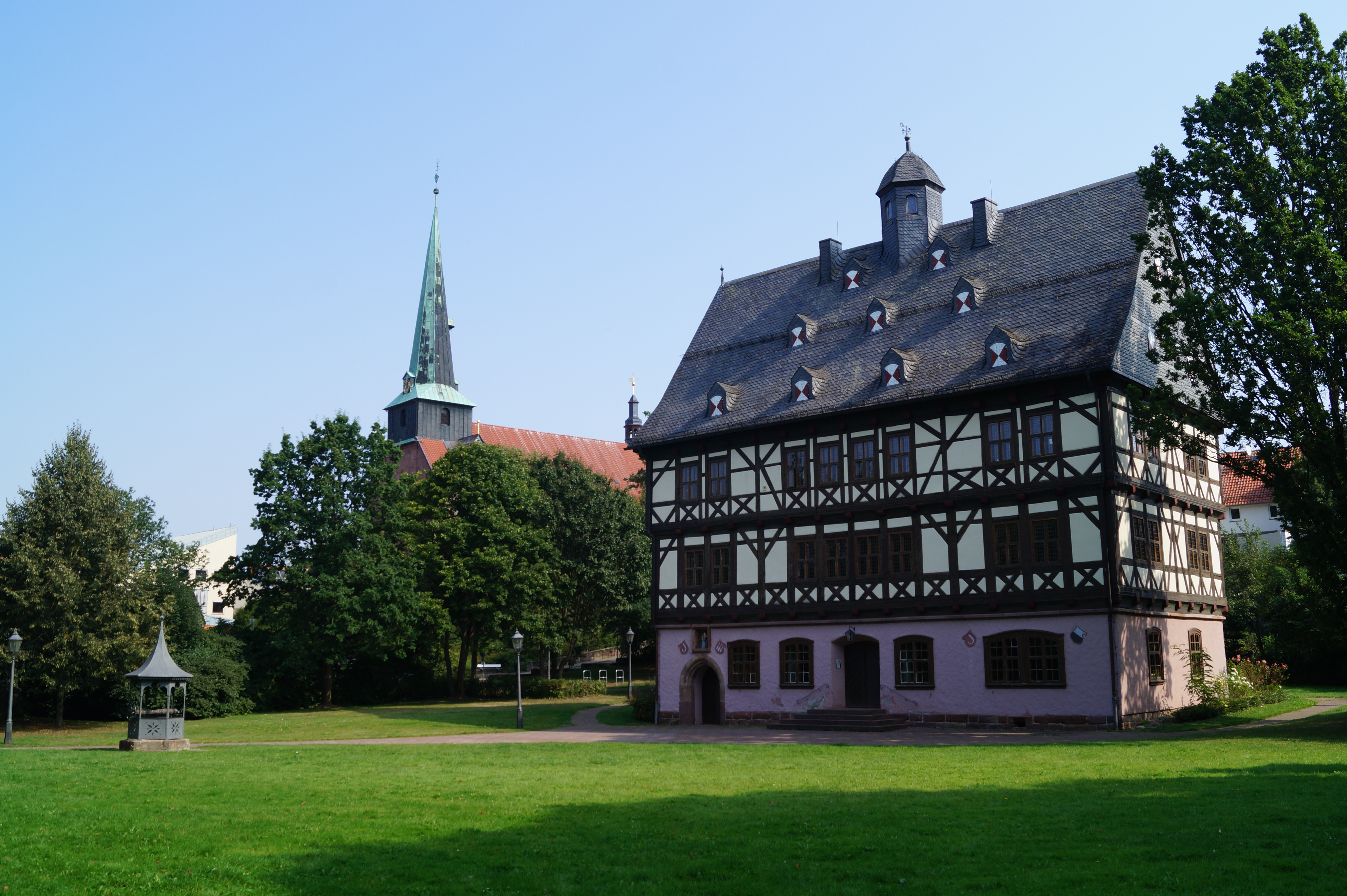 Das "Haus auf dem Wall", genannt "Schloss" in Gieboldehausen